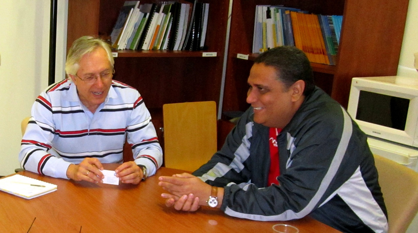 OSE España